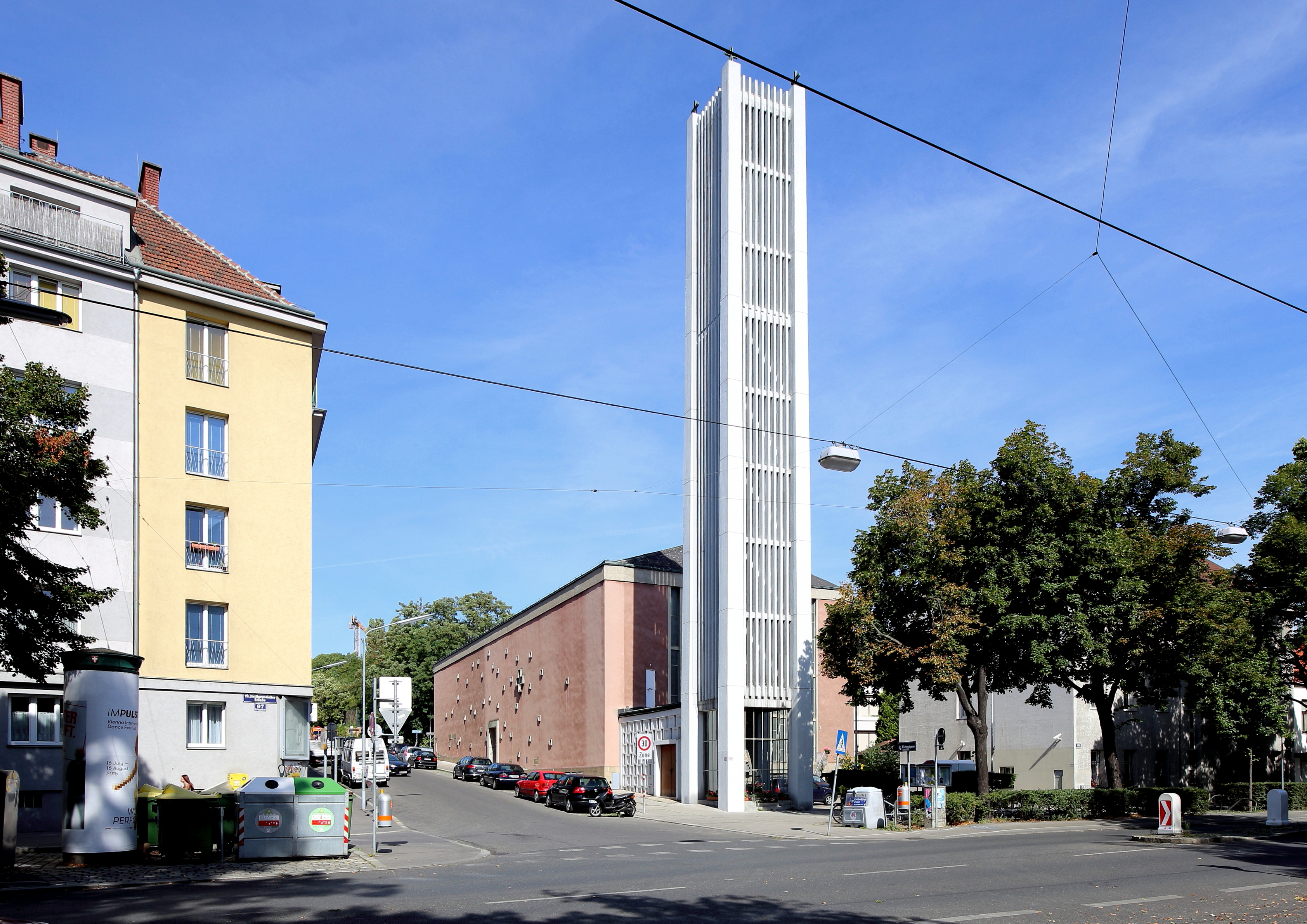 Südostansicht der röm.-kath. Pfarrkirche Maria, Mutter der Gnaden an der Adresse Heiligenstädter Straße 101 in Unterheiligenstadt, ein Wiener Stadtteil im 19. Bezirk Döbling. Der zweistöckige Saalbau mit einem Grundriss in Form eines gleichseitigen Dreiecks sowie abgerundetem Chorraum und Zeltdach wurde ab 1965 nach Plänen des Architekten Carl Müller und seines Sohnes errichtet und am 5. November 1966 geweiht.